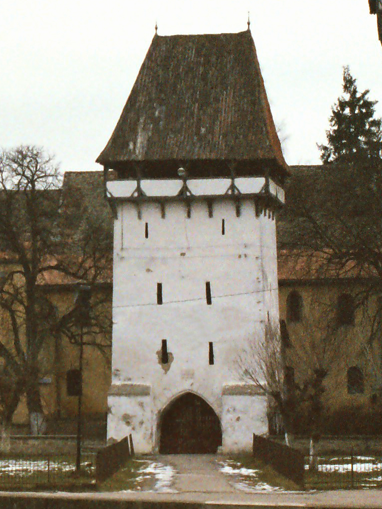 Agnetheln Torturm KB